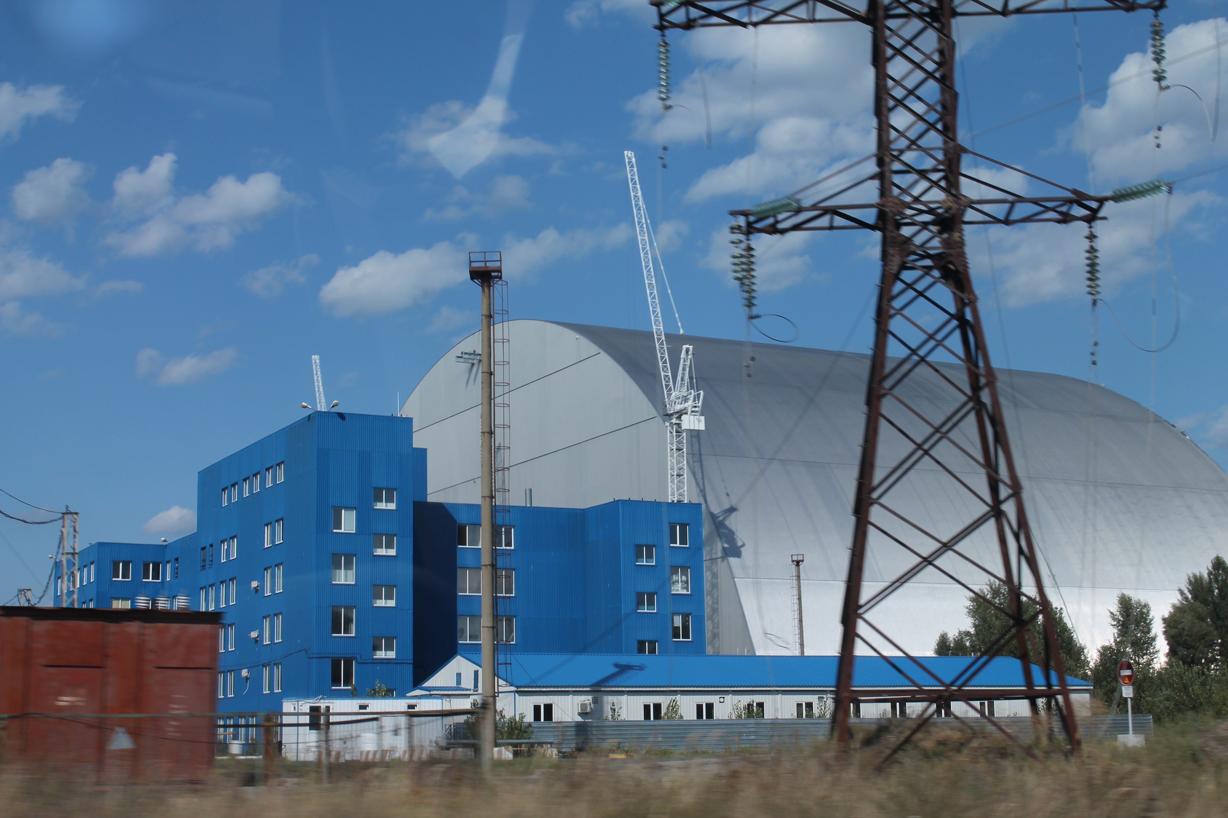 Sarkofag, år 2016